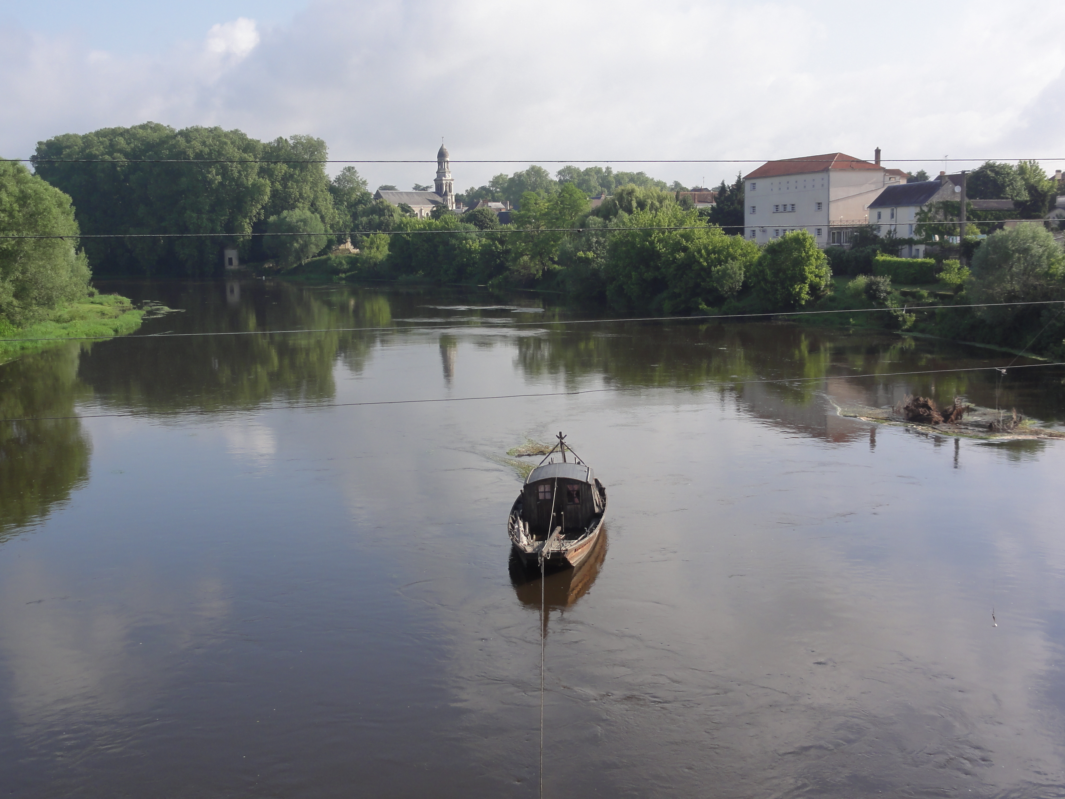 Les Ormes (Vienne) vue de la Vienne